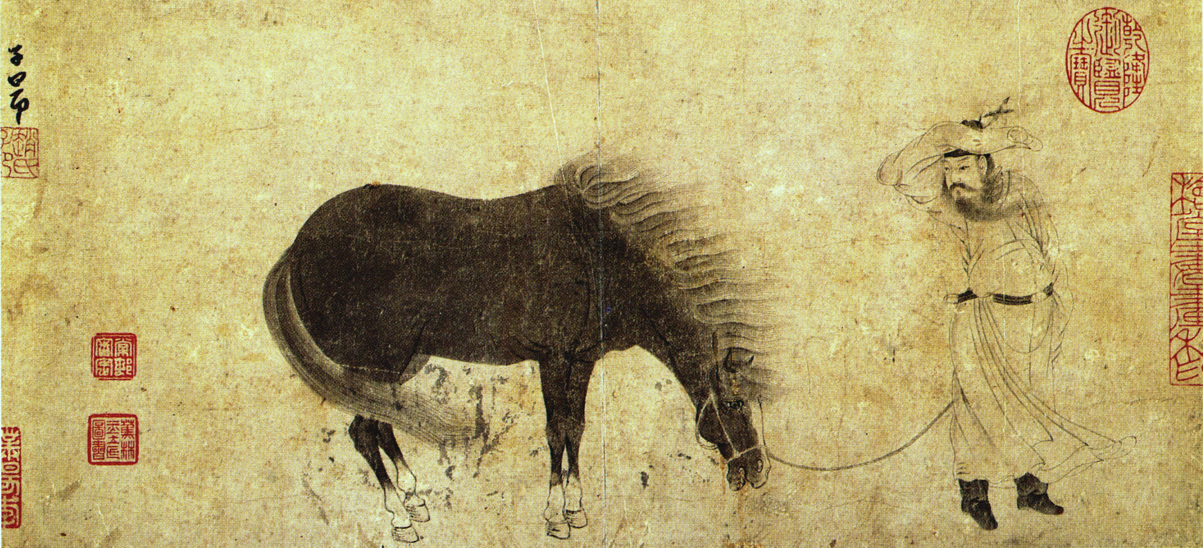 Zhao Mengfu 1254 1322 A l'unisson (Tiaoliang tu) Peinture, encre sur papier feuille d'album 22,7x49cm